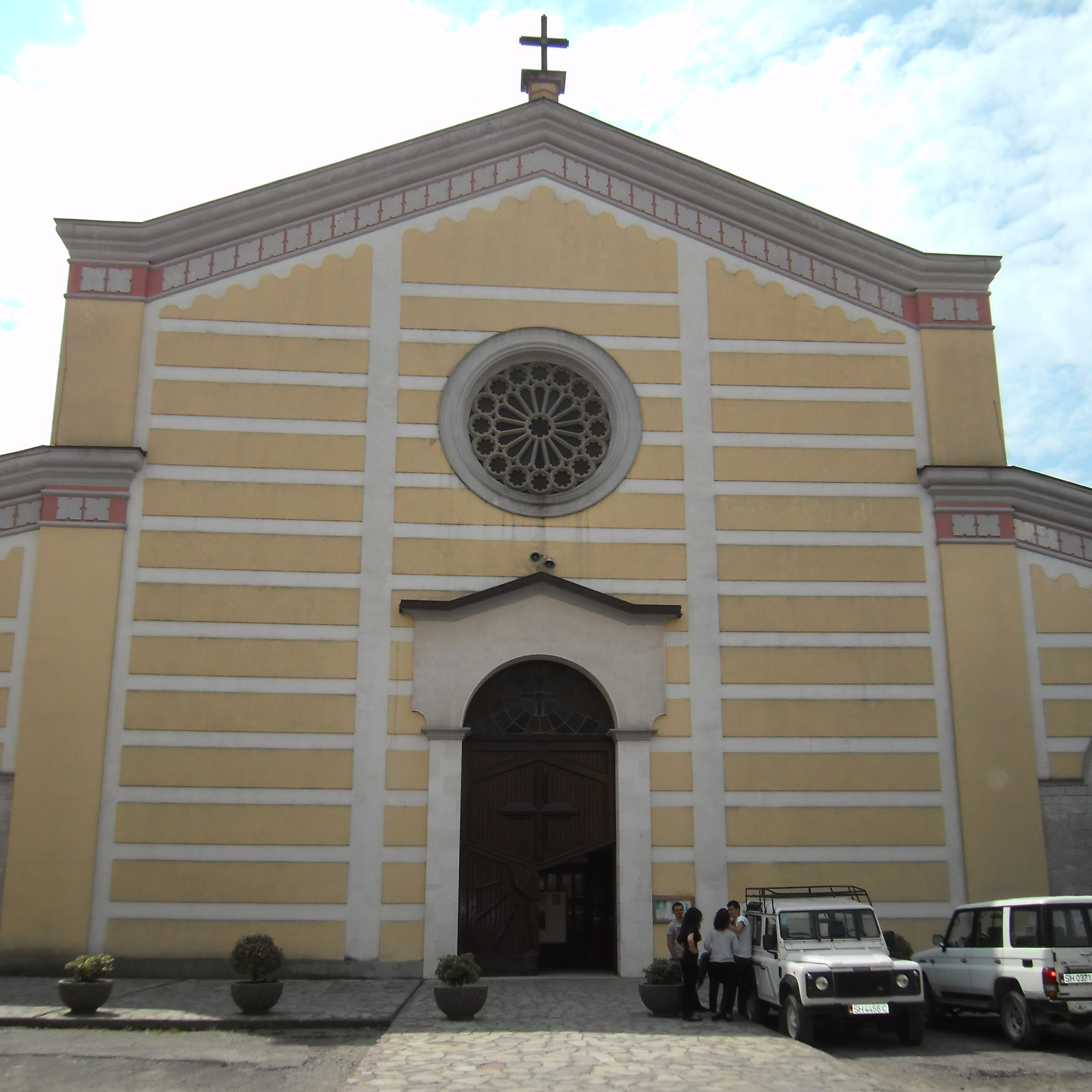 Kathedrale von Shkodra (Frontansicht)